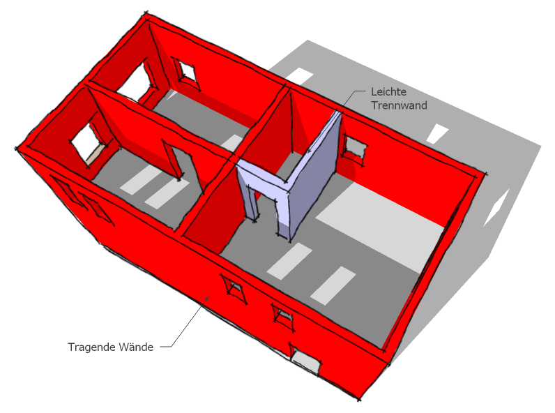 Darstellung Massivbauweise